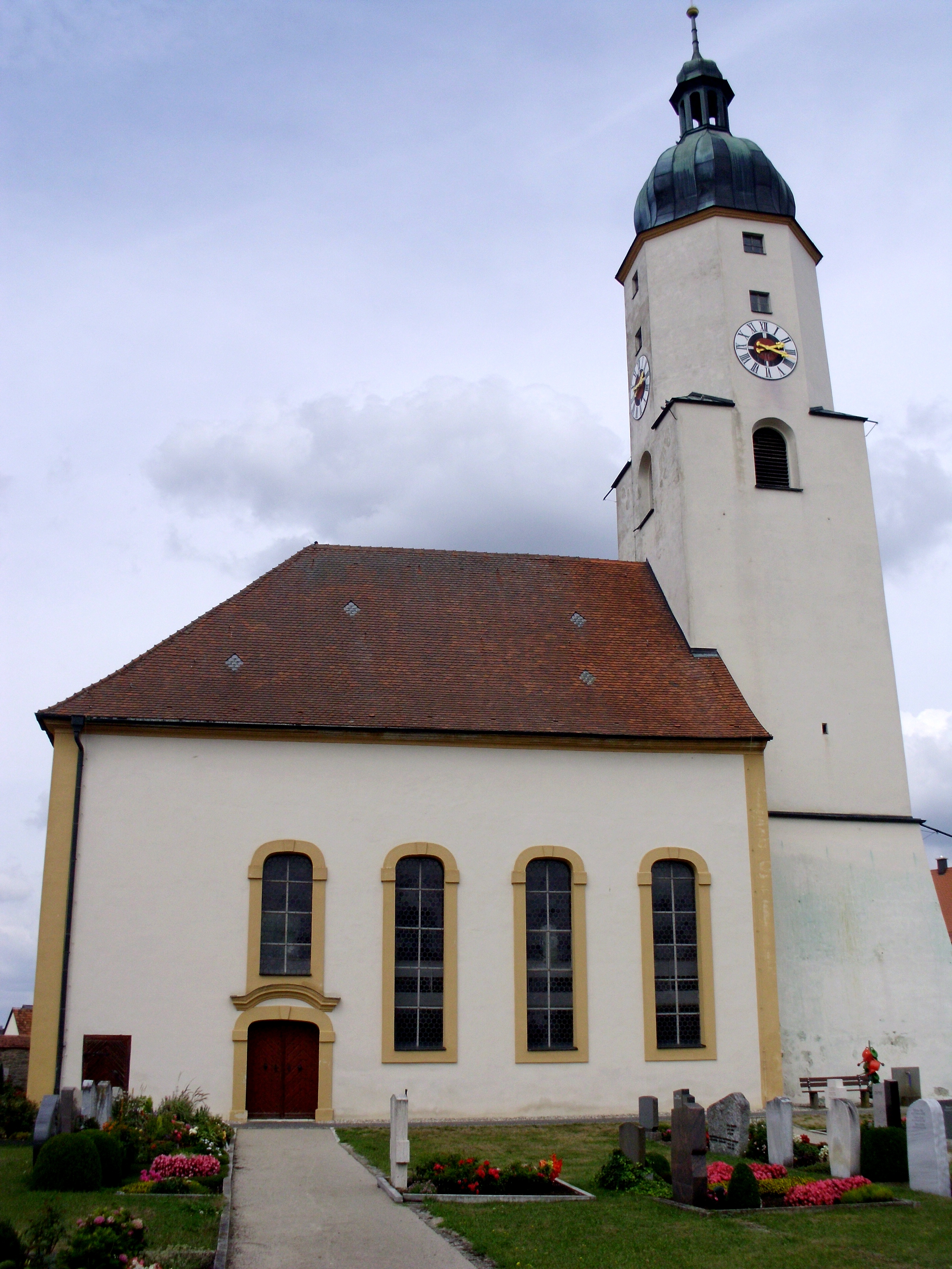 Sulzkirchen, Ortsteil von Freystadt im oberpfälzischen Landkreis Neumarkt in Bayern, Evang.-luth. Pfarrkirche St. Georg